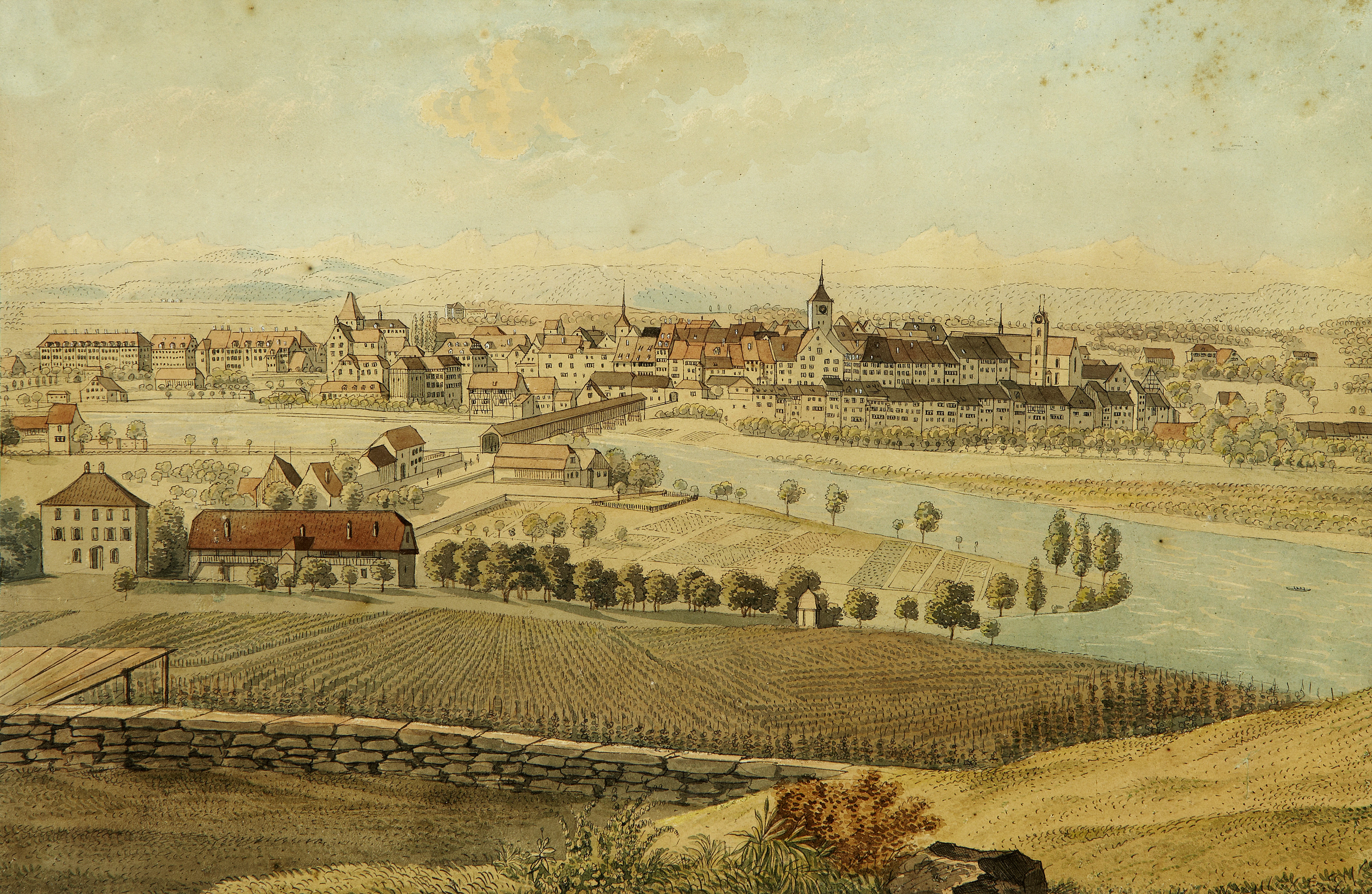 Aarau.